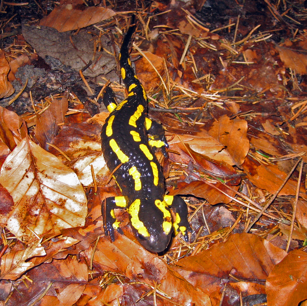 Feuersalamander (Salamandra salamandra)